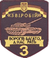 Нарукавний знак 3-го окремого танкового батальйону